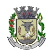 Brasao do município de Autazes, Amazonas, Brasil.